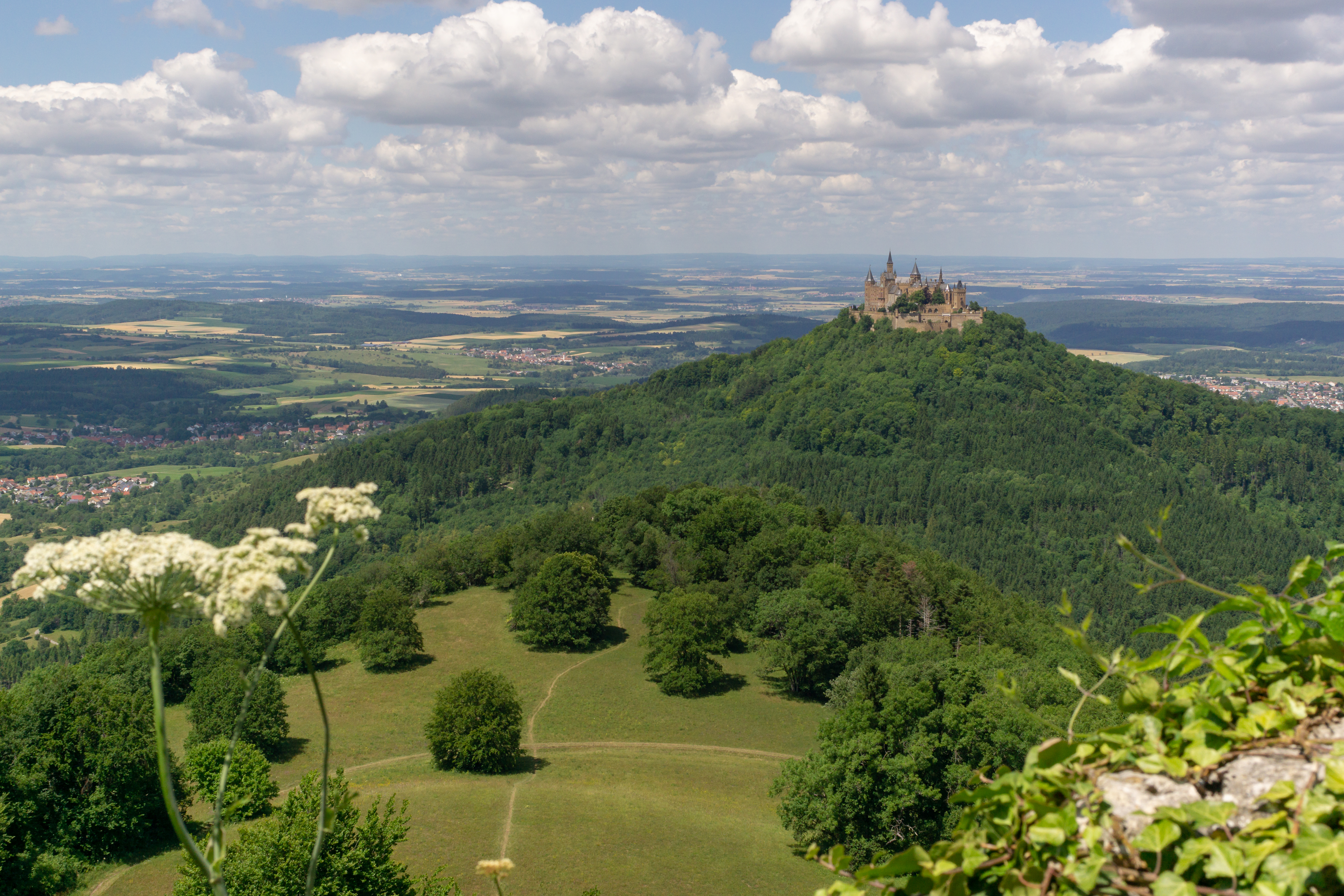 Blick vom Zeller Horn: Landschaftsschutzgebiet Albstadt-Bitz 4.17.001 mit Blick auf Naturschutzebiet Zellerhornwiese 4.032. Dainter die Burg Hohenzollern